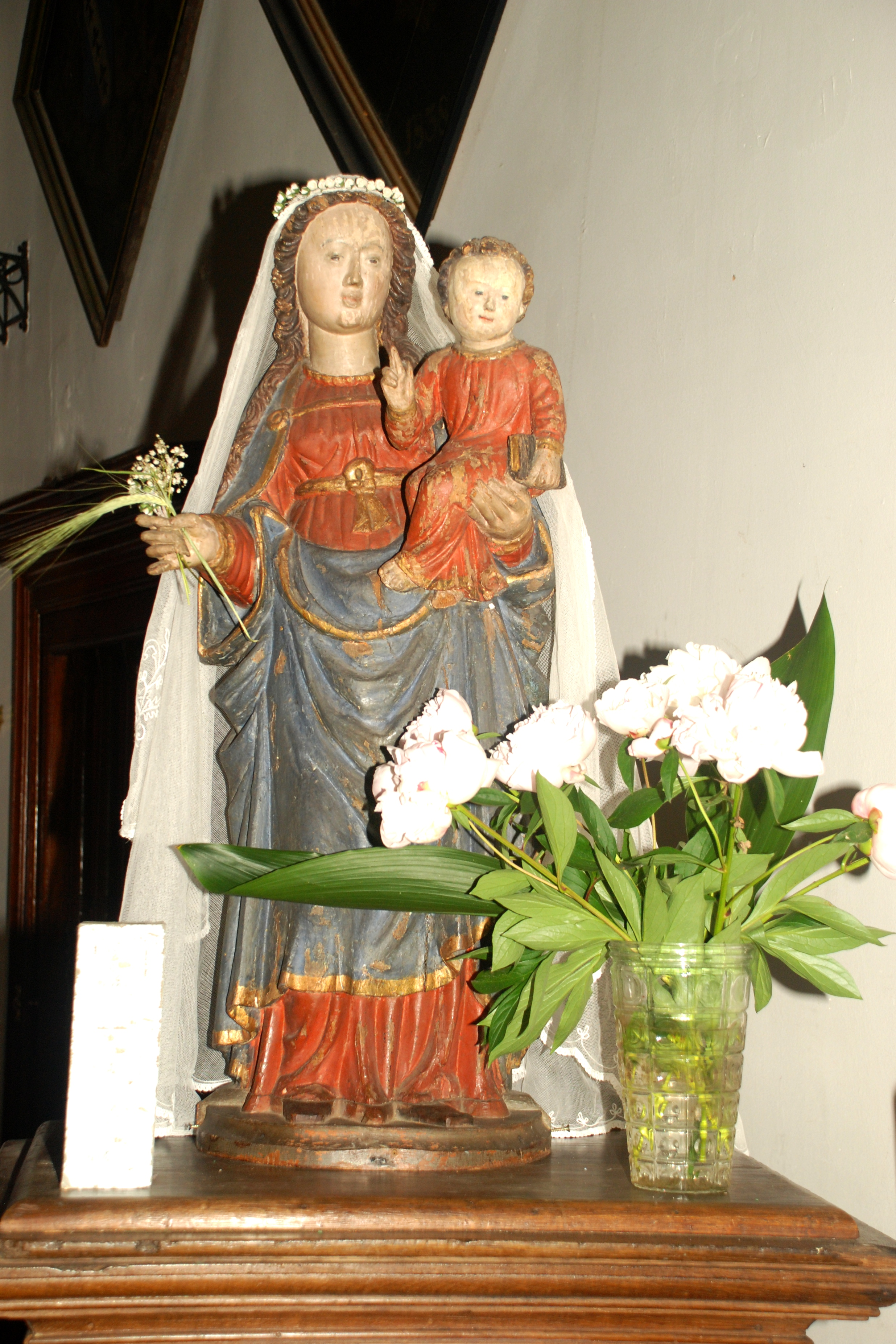 Belgique - Bousval - Notre-Dame du Try-au-Chêne